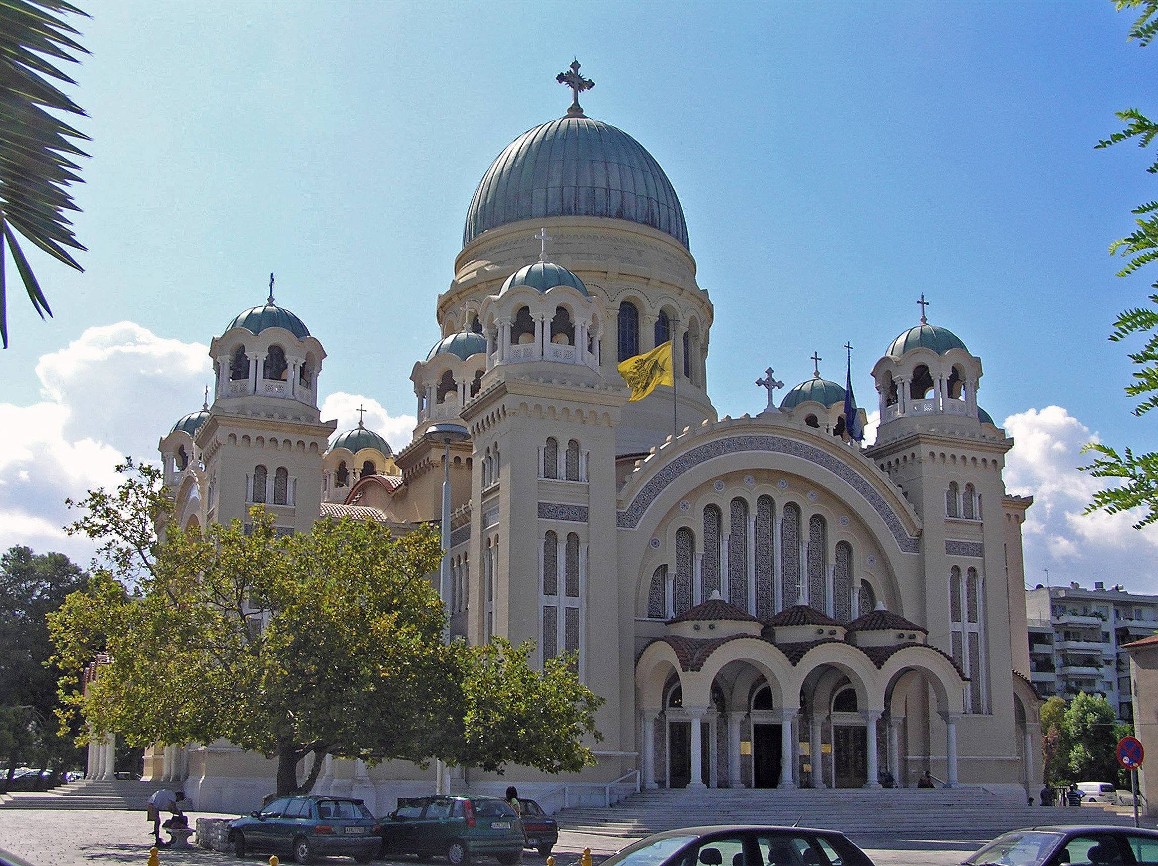 Патры. Храм Андрея Первозванного